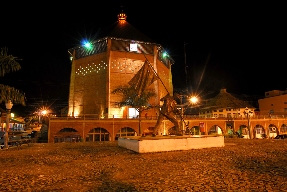 Foto: Gleilson Miranda / Governo do Acre Saiba mais